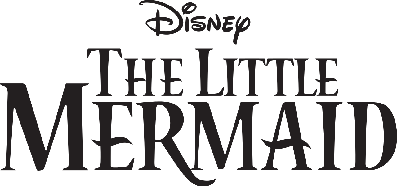 בת הים הקטנה (סרט, 2018) לוגו